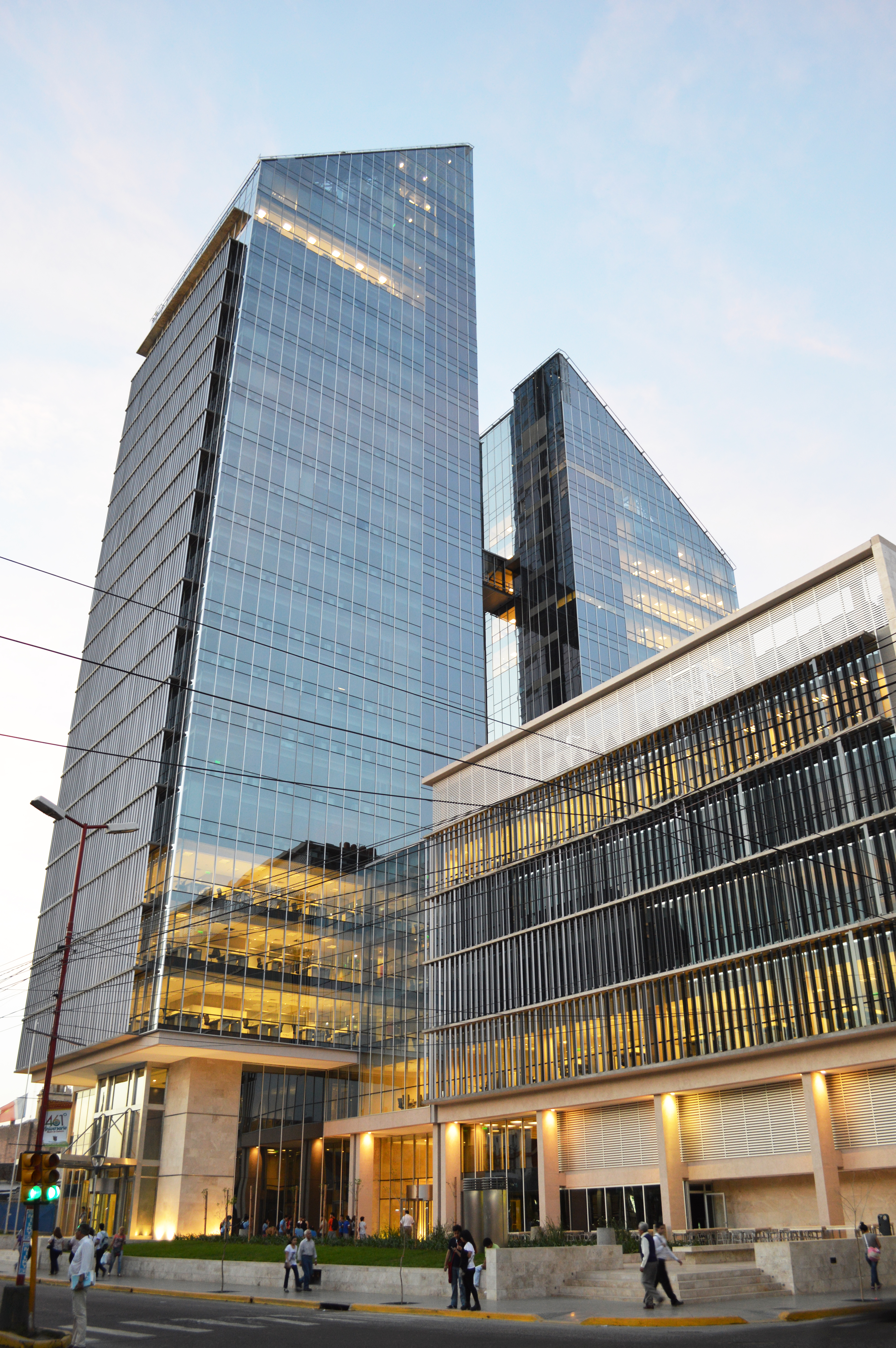 Vista del Complejo Juan Felipe Ibarra desde Avenida Belgrano, en la ciudad de Santiago del Estero, Argentina.